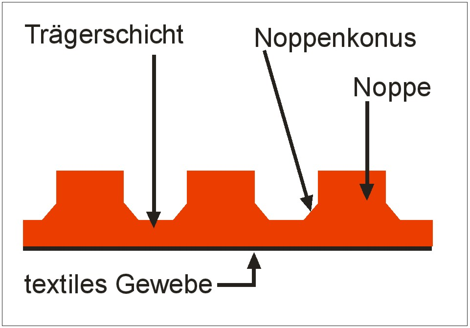 Schema-Zeichnung TT-Belag Noppengummi